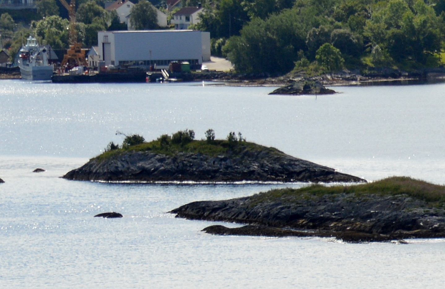 Notholmen bei Alesund, Norwegen, im Vordergrund Langedraget